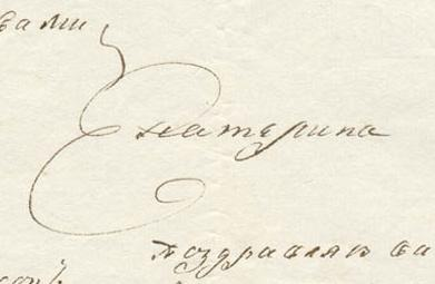 Автограф Екатерины Второй. 1787 год.